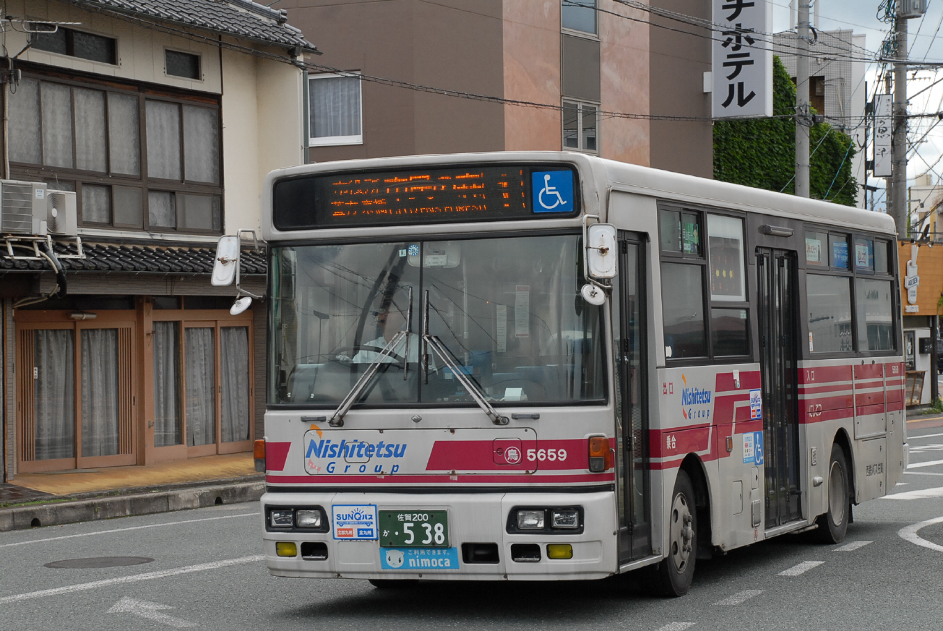 鳥栖駅前にて、2019-7-24撮影